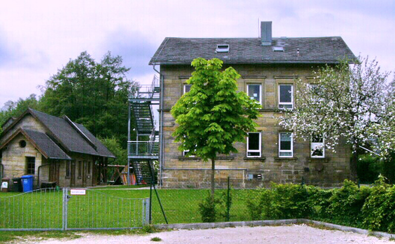 Kindergarten in Glashütten, Standort des abgegangenen Schlosses